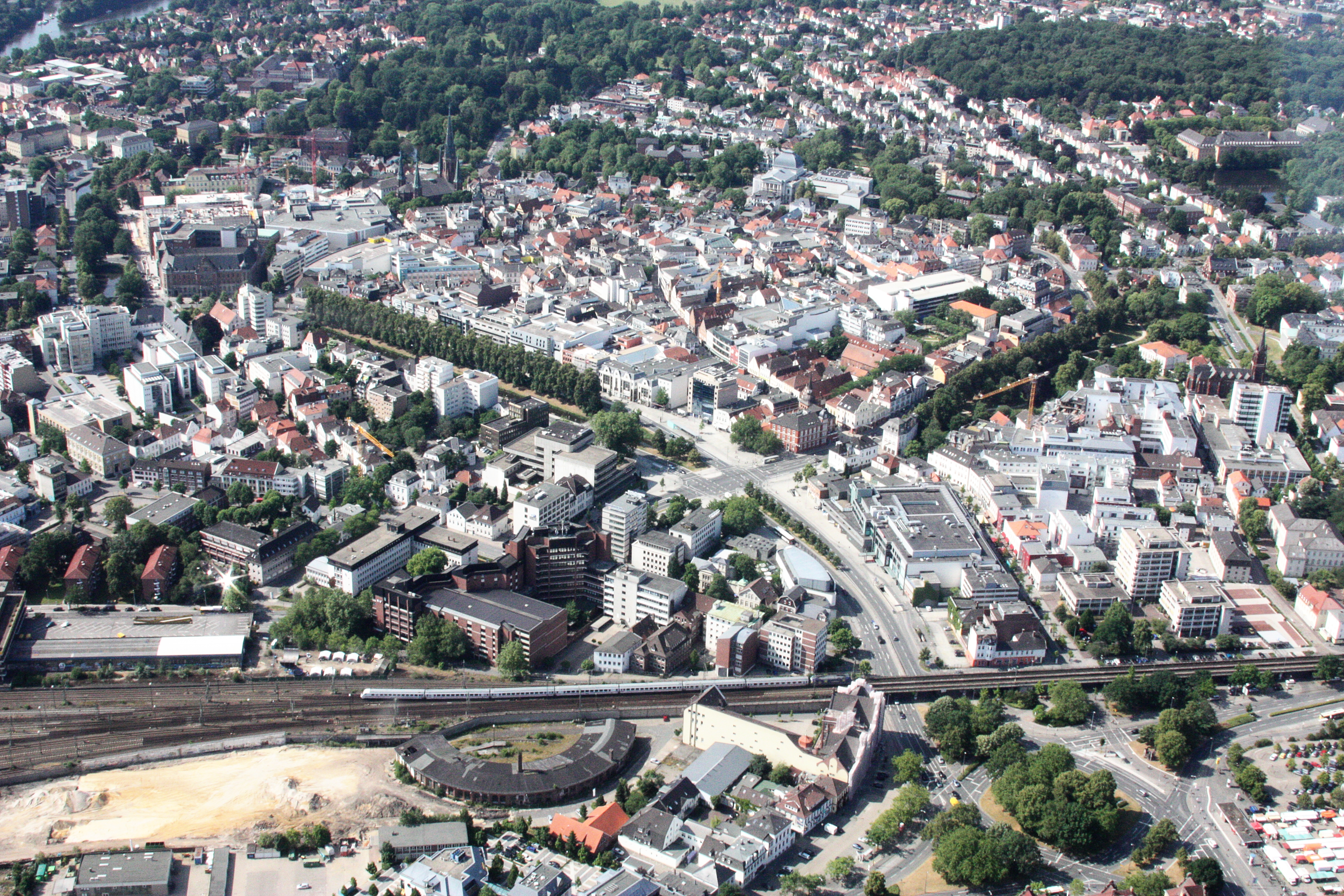 Luftaufnahmen Oldenburg (Oldenburg), mit Weiterflug nach Westen; 1500 Fuß Flughöhe; Juli 2010; Originalfoto bearbeitet: Tonwertkorrektur und Bild geschärft mit Hochpassfilter